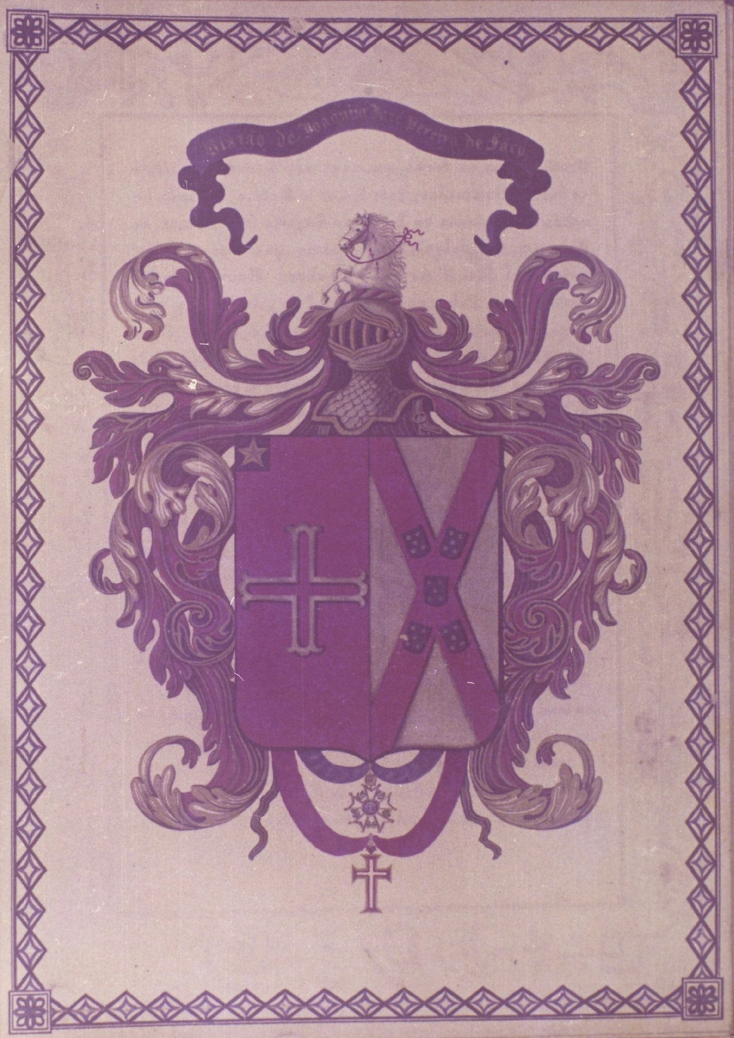 Brasão de Joaquim José Pereira de Faro, 1º Barão do Rio Bonito (RJ). Fundo: Brasões.